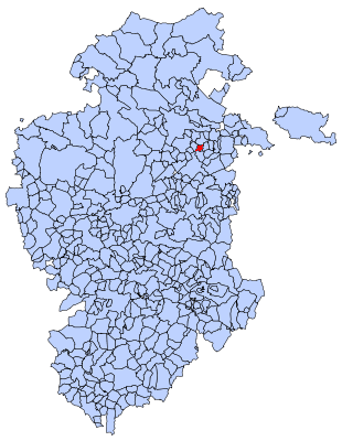 Berzosa de Bureba en Burgos